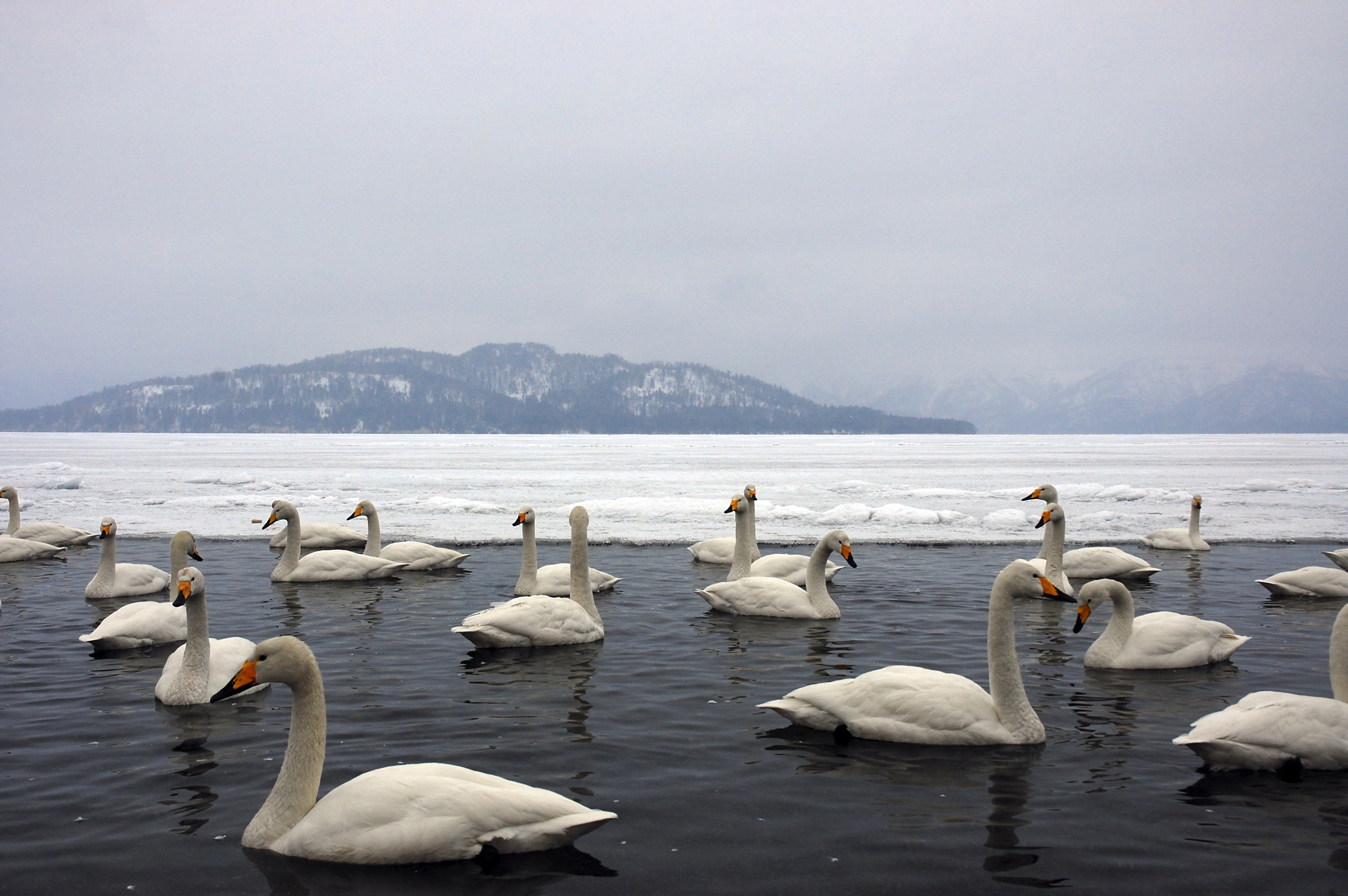 Des cygnes qui chillent sur le lac Kussharo, puisque l eau est chaude a cause des volcans pres.